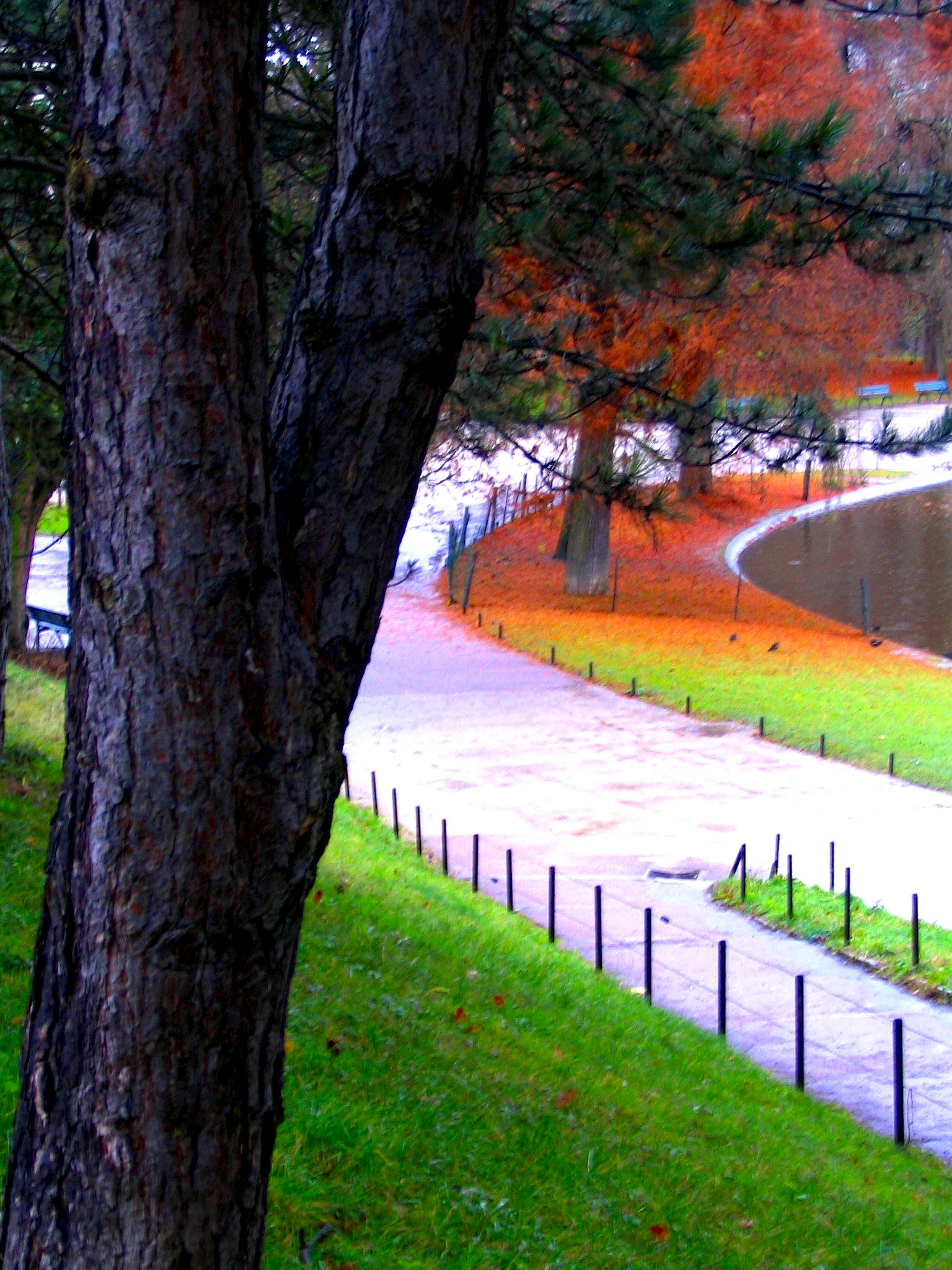 Lac de Saint-Mandé - Bois de Vincennes - Paris XIIe arrondissement, France.